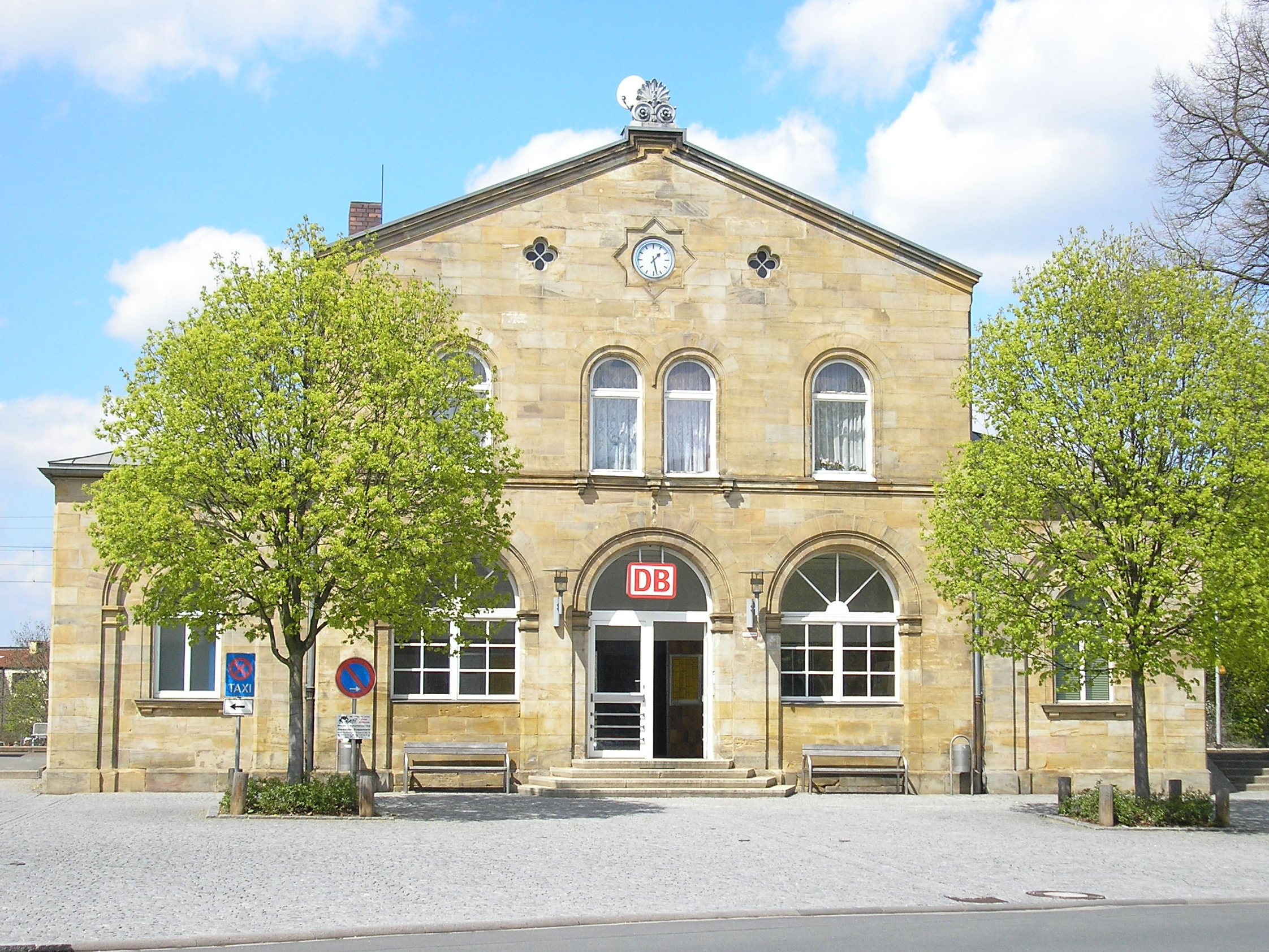 Bahnhofsgebäude von Bad Staffelstein (Bayern, Deutschland).